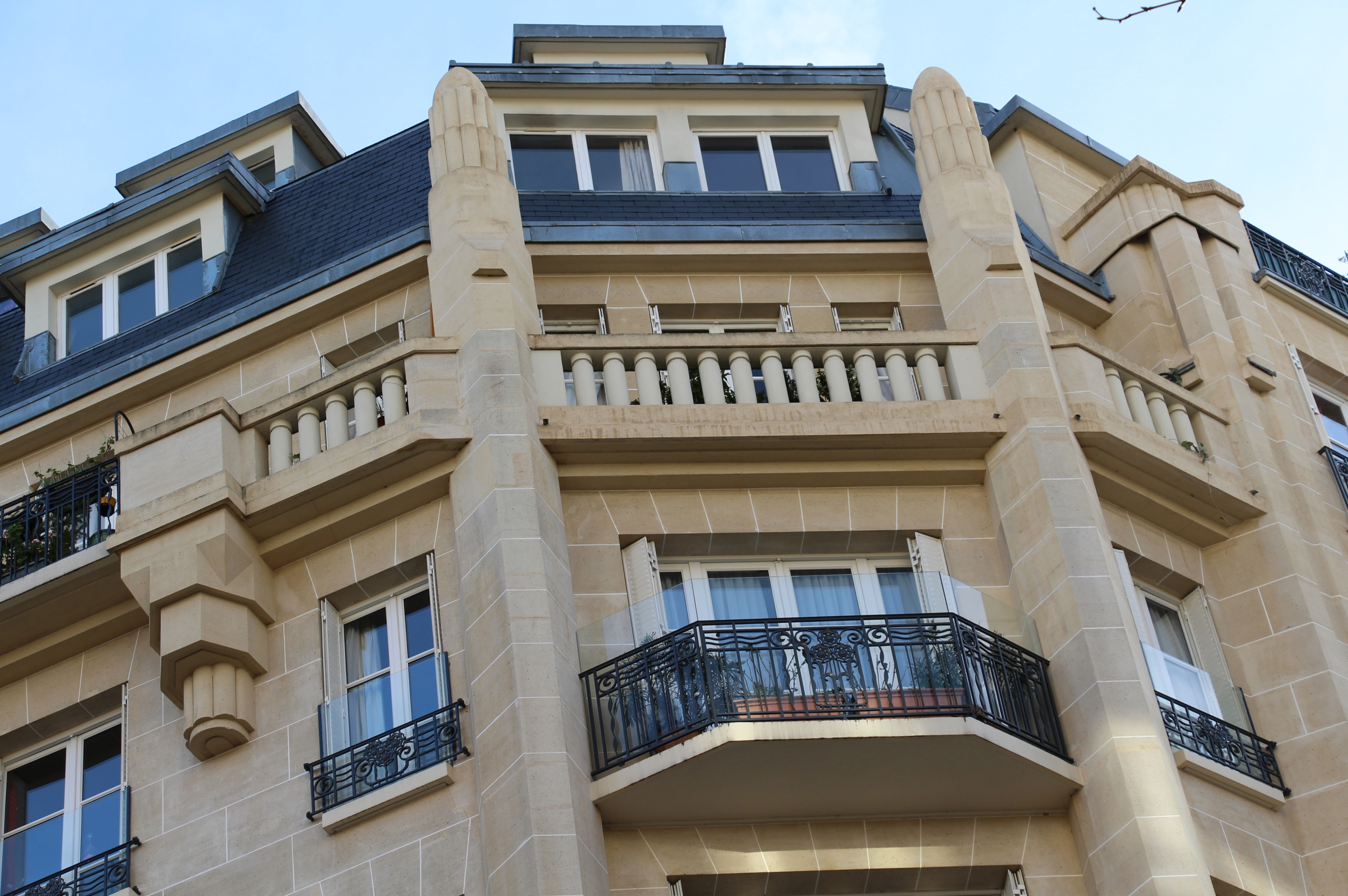 (Auteuil) Rue Molitor/Rue Boileau Art deco. Arch. Léon Gaudibert and Paul Jumelle 1927.